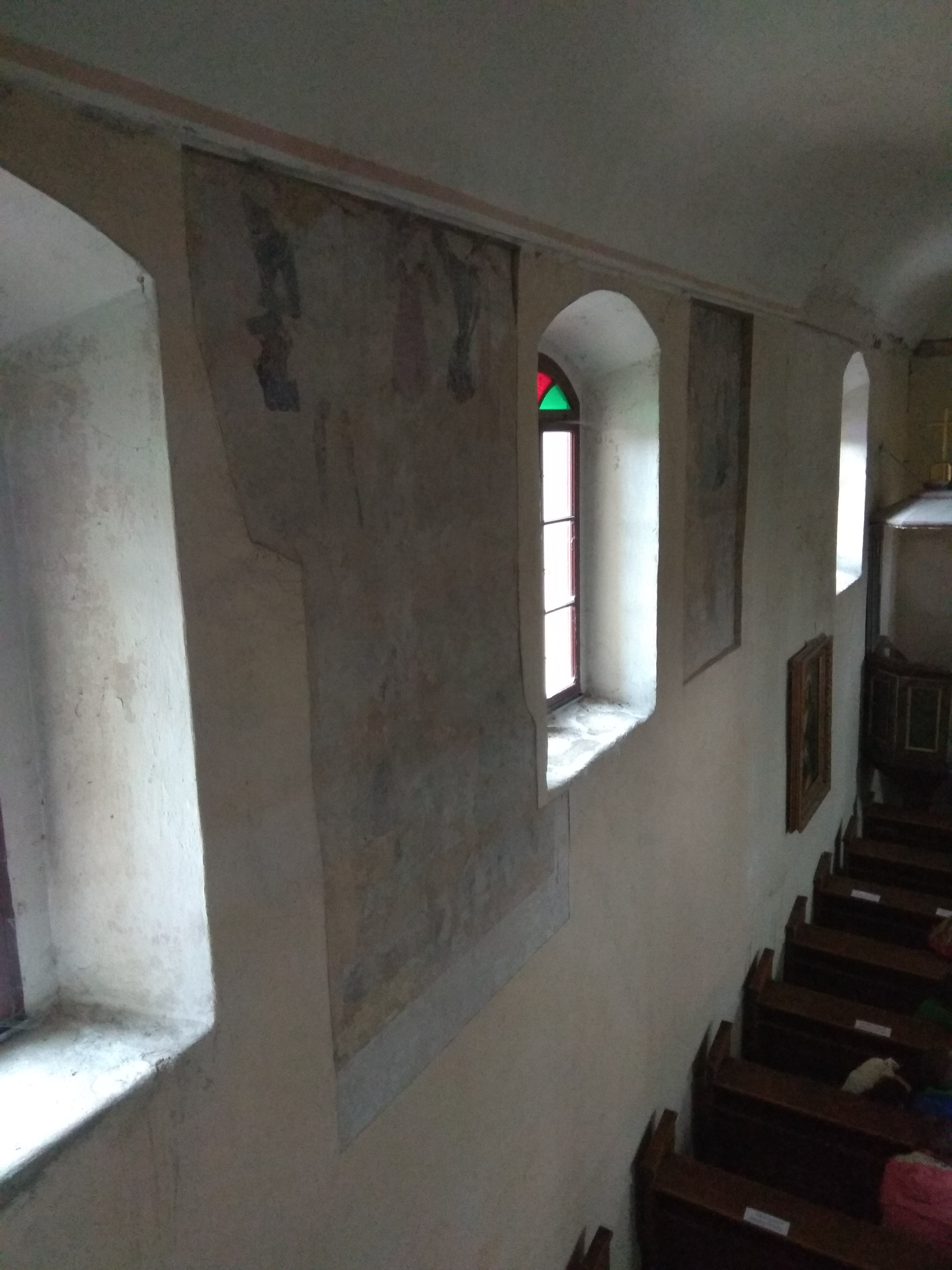 Olešky kostel - interiér